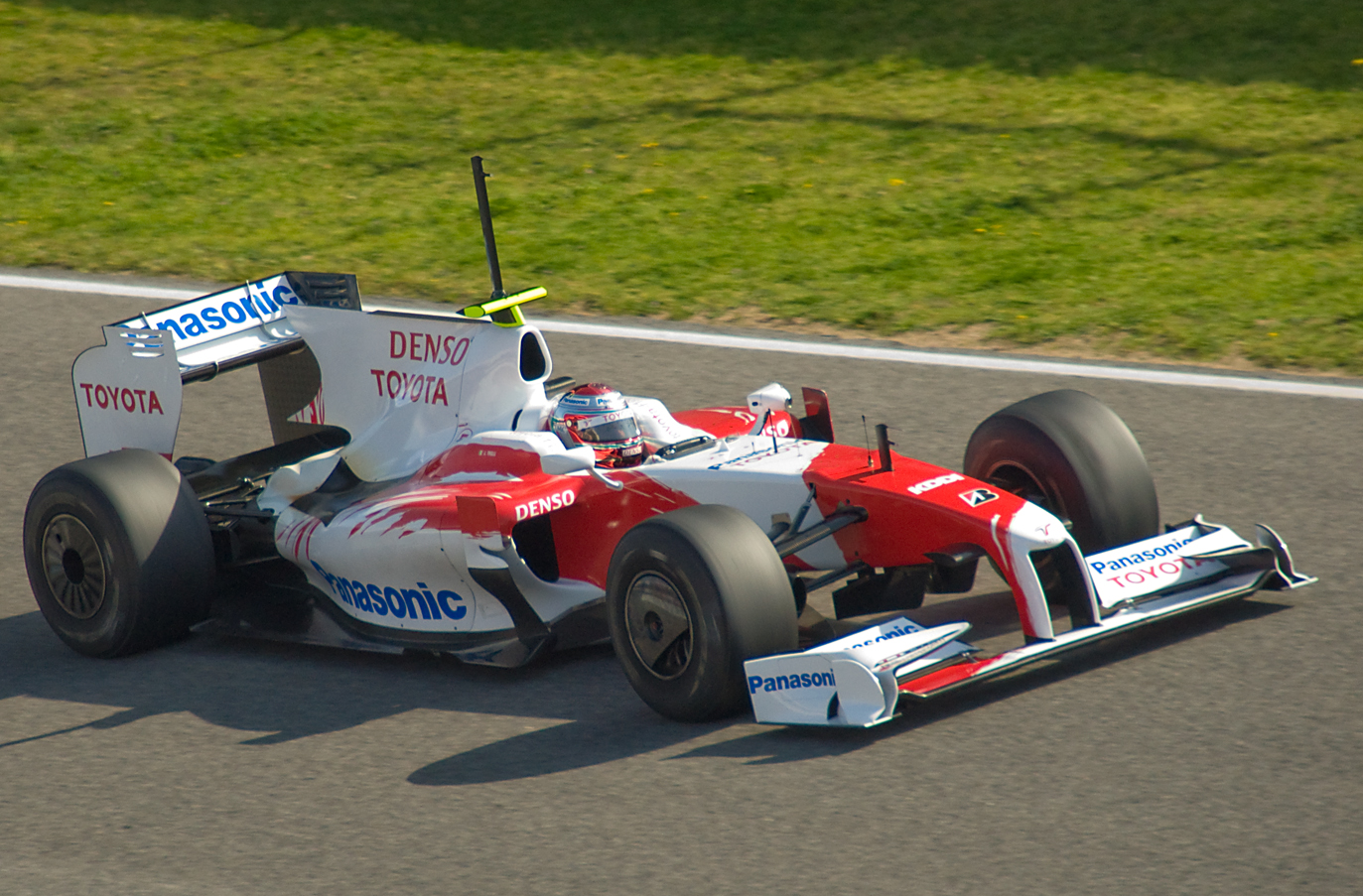 Nikon D90 + Sigma 18-200 DC OS HSM 1/1600s - F/6.3 - 200mm - ISO1600